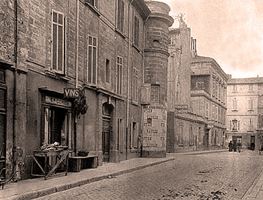 Tour de Casal, 6 rue Joseph Vernet